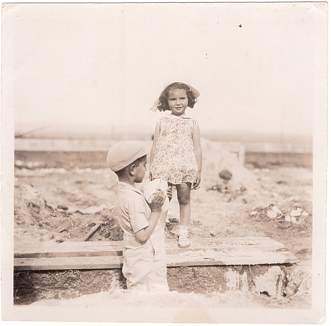 יונה איצקוביץ-ריס ודוד ארטן מניחים את אבן הפינה לחב׳ פרוטרום 10.04.34